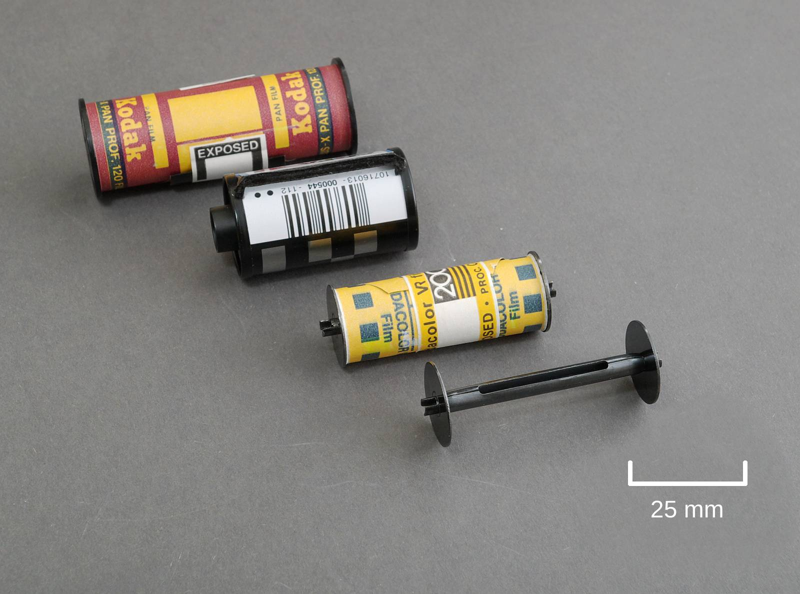 Rollfilm 127 mit Leerspule, Kleinbildpatrone 135 und Rollfilm 120 im Vergleich